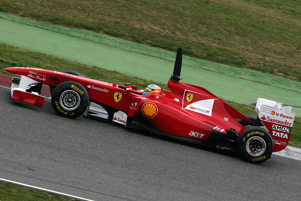 F1 Test Days. Circuit de Catalunya